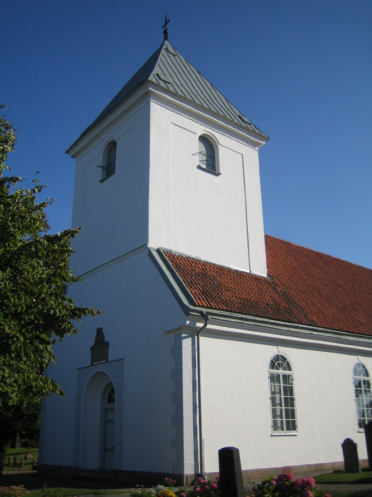 Börringe kyrka